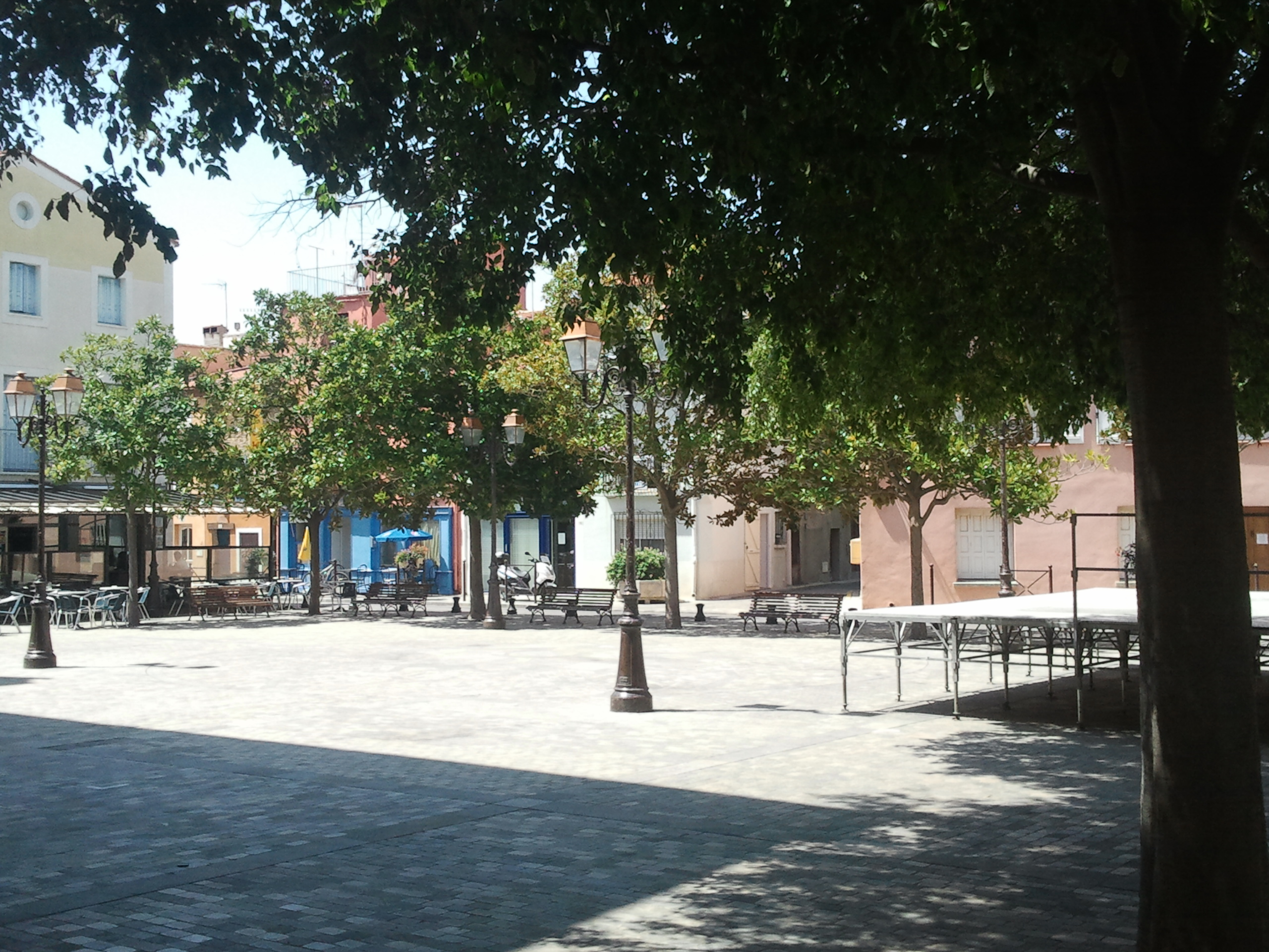 La place de la mairie à Sainte-Marie